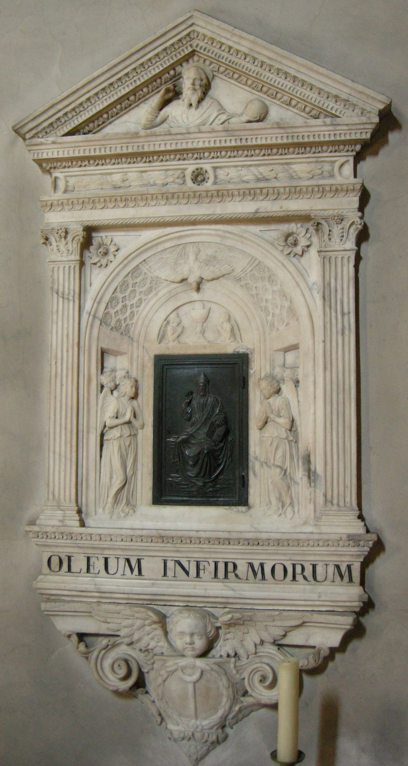 Sant'egidio (firenze), ciborio di bernardo rossellino